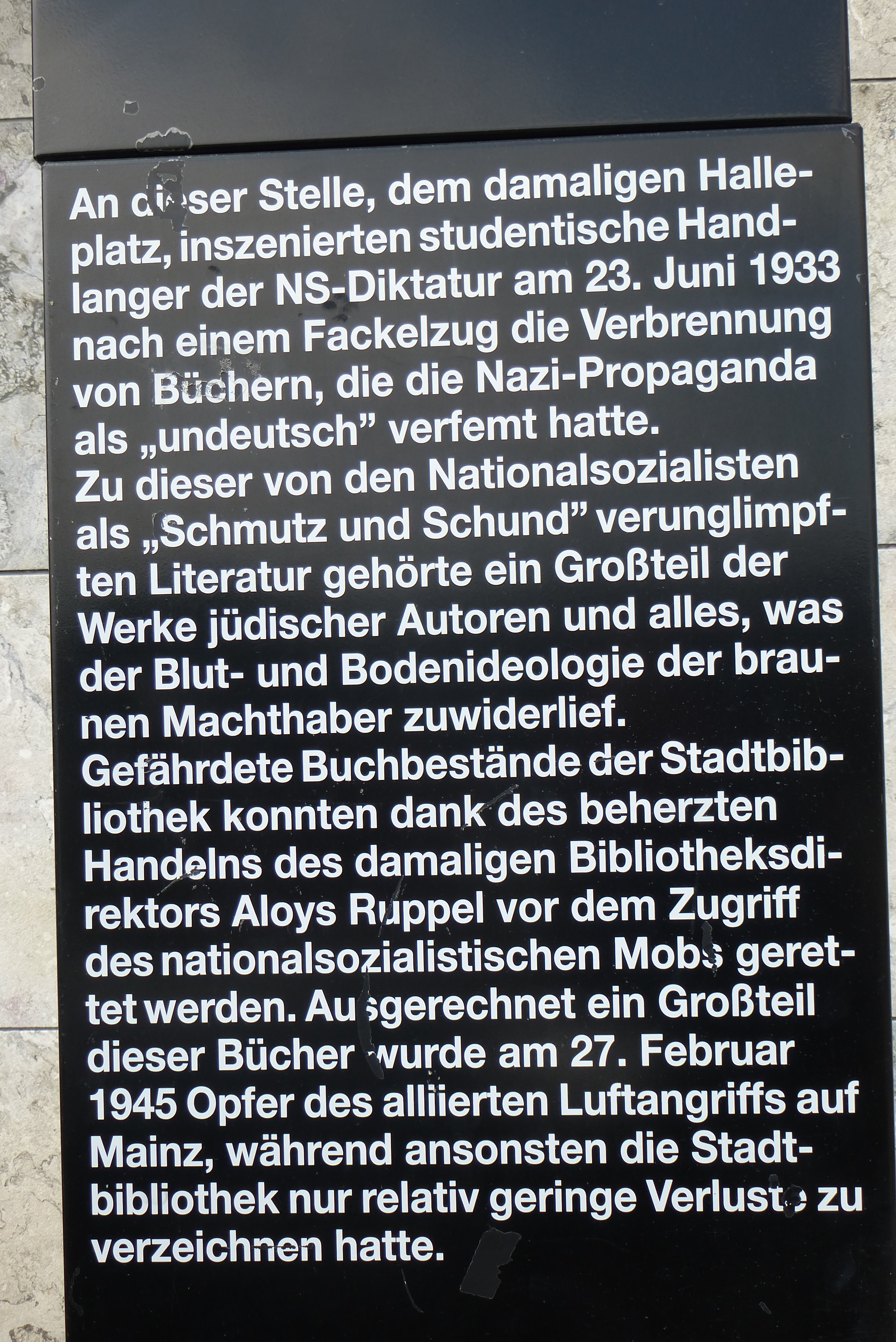 plaque commémorative de l'autodafé du 23 juin 1933 sur la rive du Rhin à Mayence